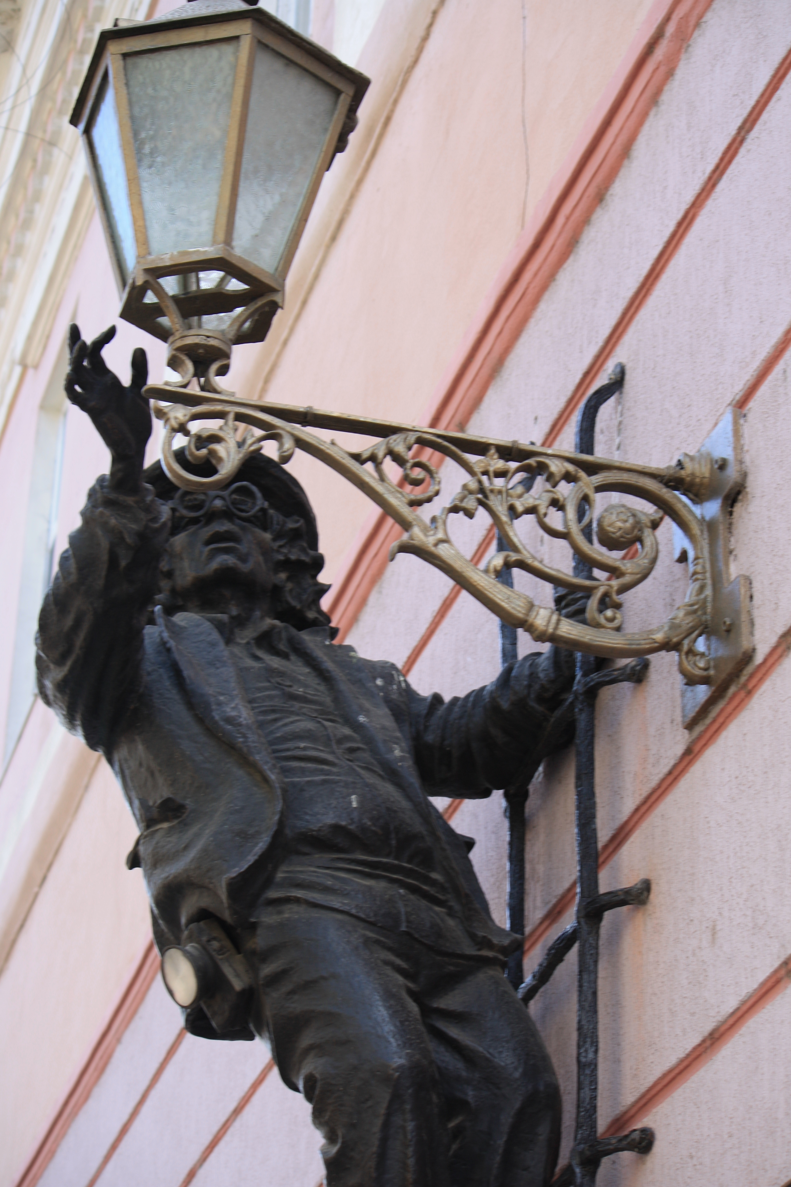 Житловий будинок, Ужгород, вул. Волошина, 7